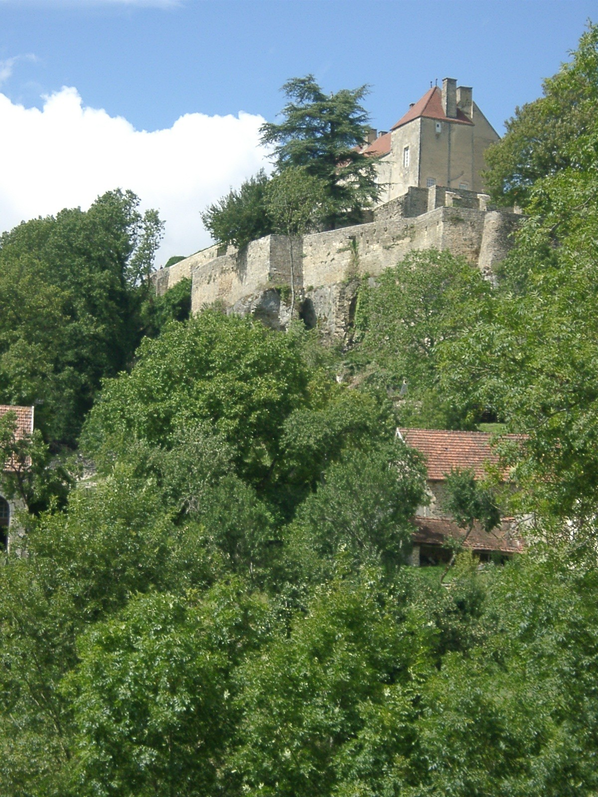 Château de Frôlois août 2006 photo personnelle - Henri JACHET